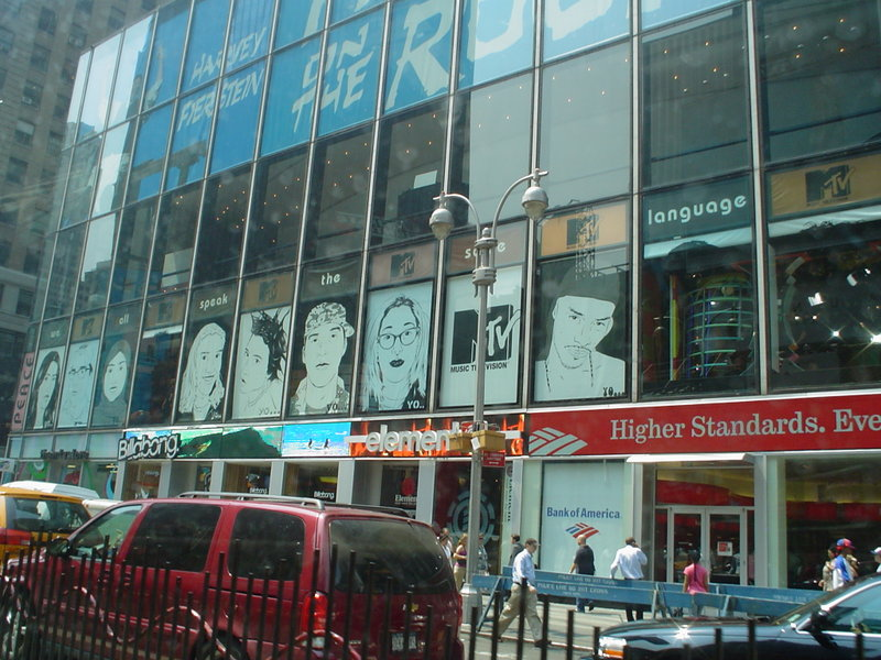 Az MTV stúdiója a Times Square-en, New York